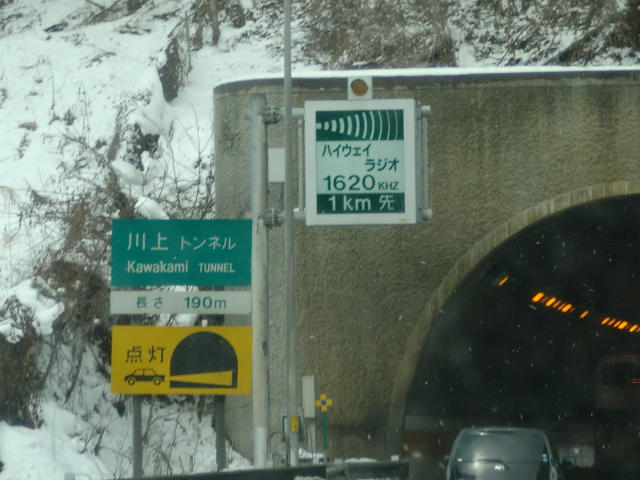 ハイウェイラジオ1km先（旧型 群馬県みなかみ町の関越道で撮影）